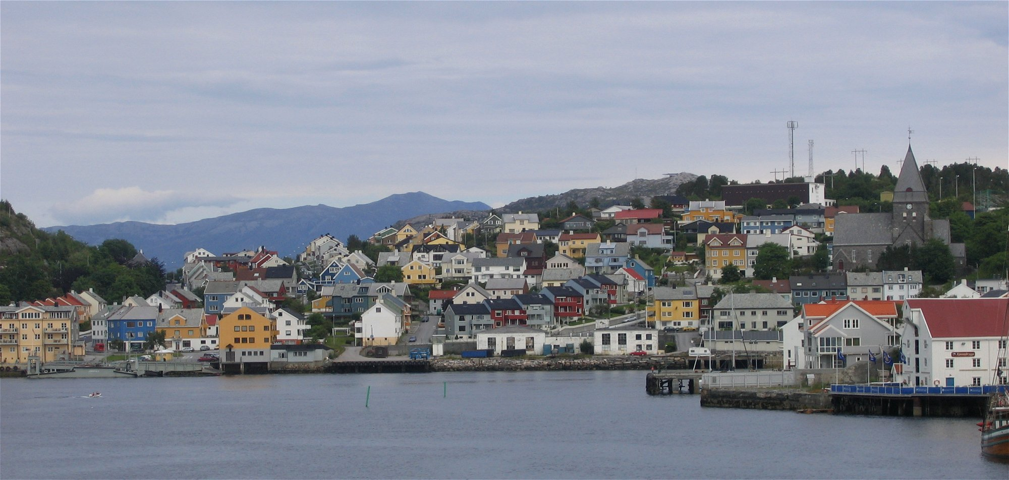 Kristiansund, Norwegen